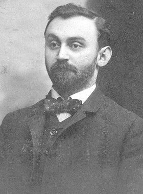 תמונתו של משה גרשון פלדשטיין